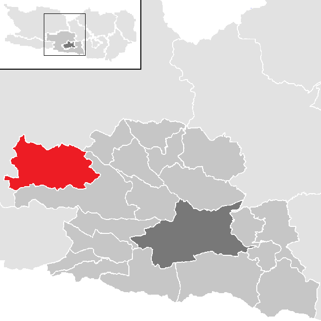 Bezirk Villach-Land